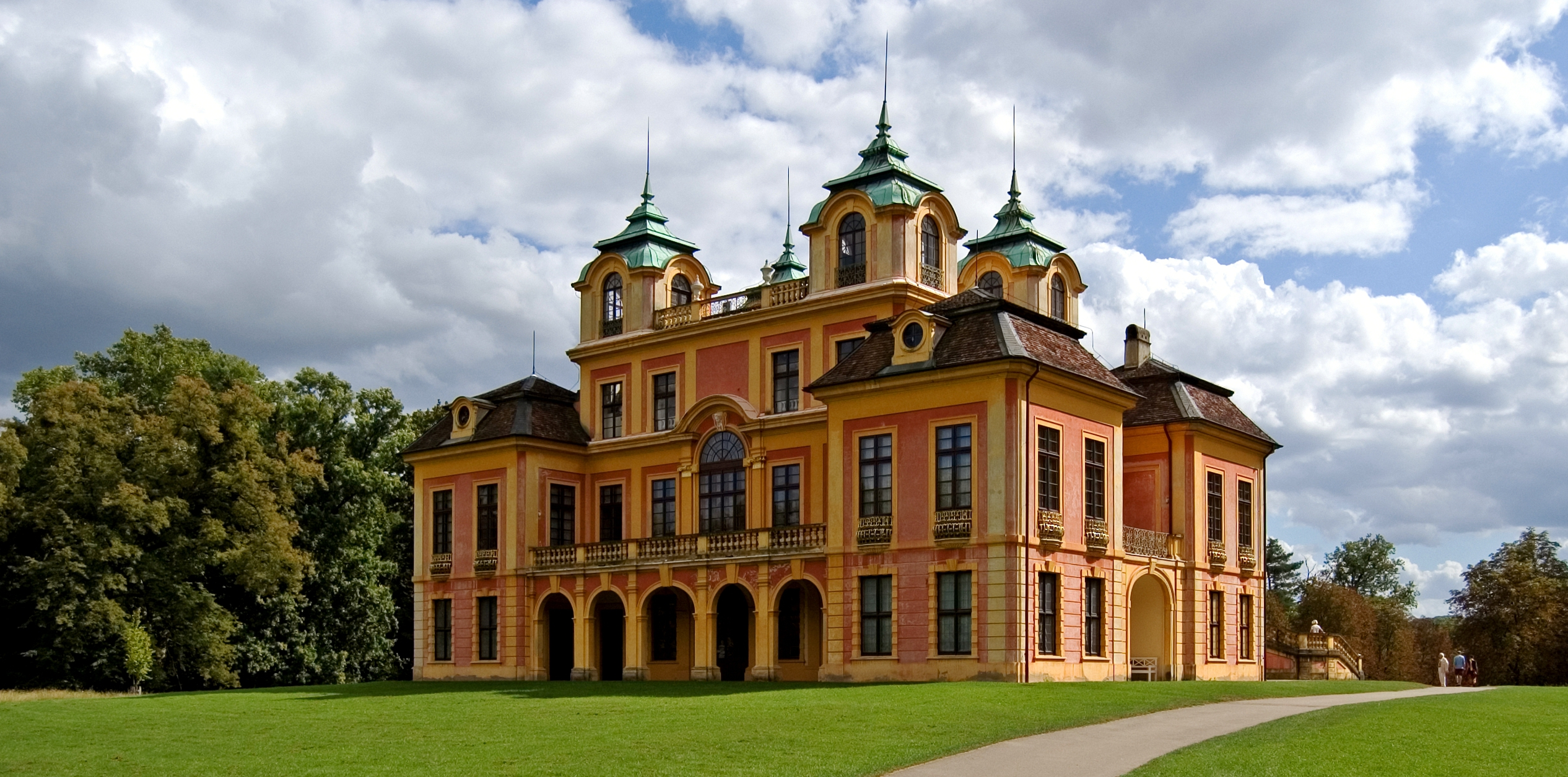 Schloss Favorite in Ludwigsburg bei Baden-Württemberg.